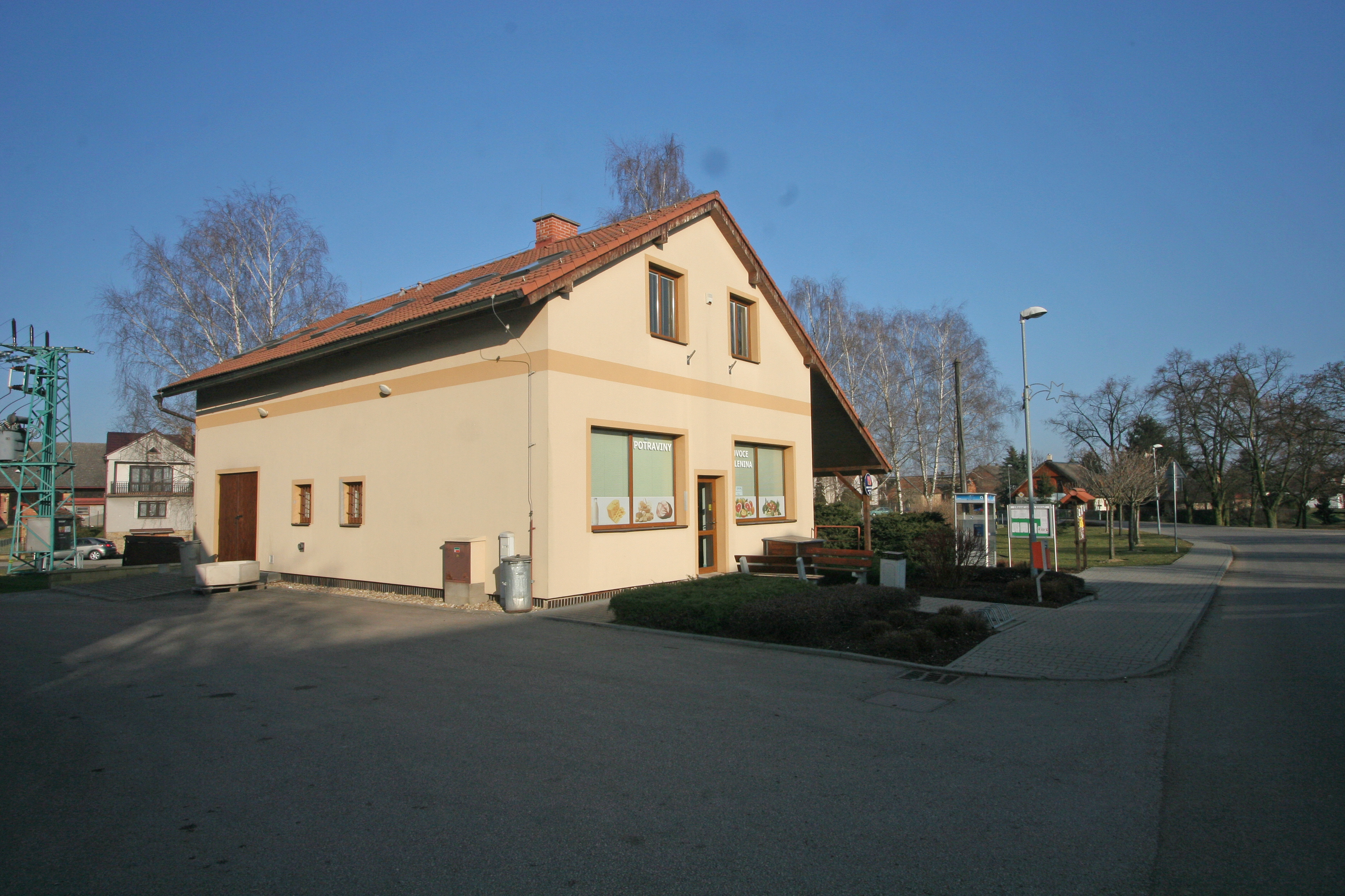 Kovač - prodejna potravin a obecní úřad